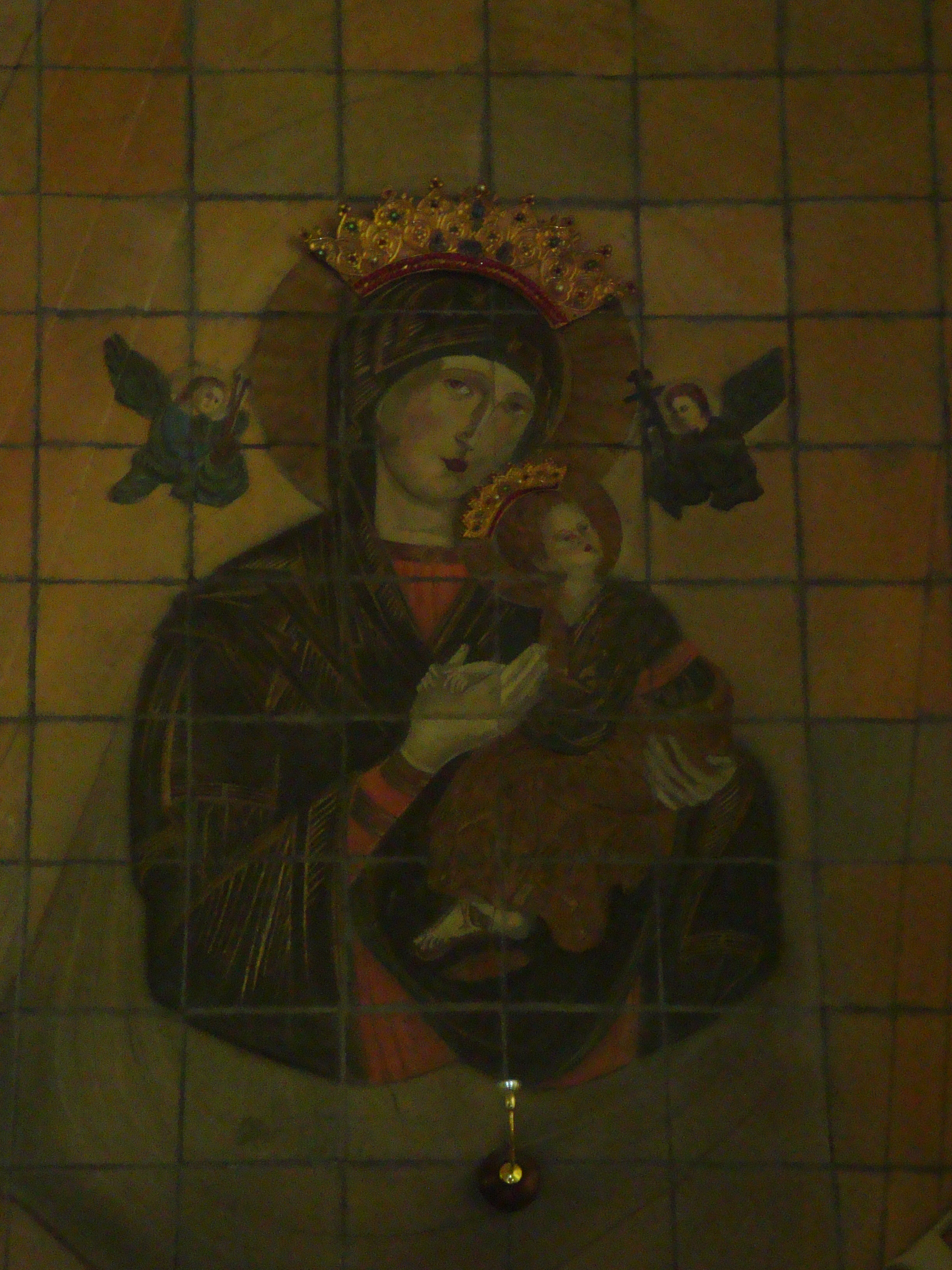 Kościół Matki Bożej Nieustającej Pomocy w Tarnobrzegu-Serbinowie